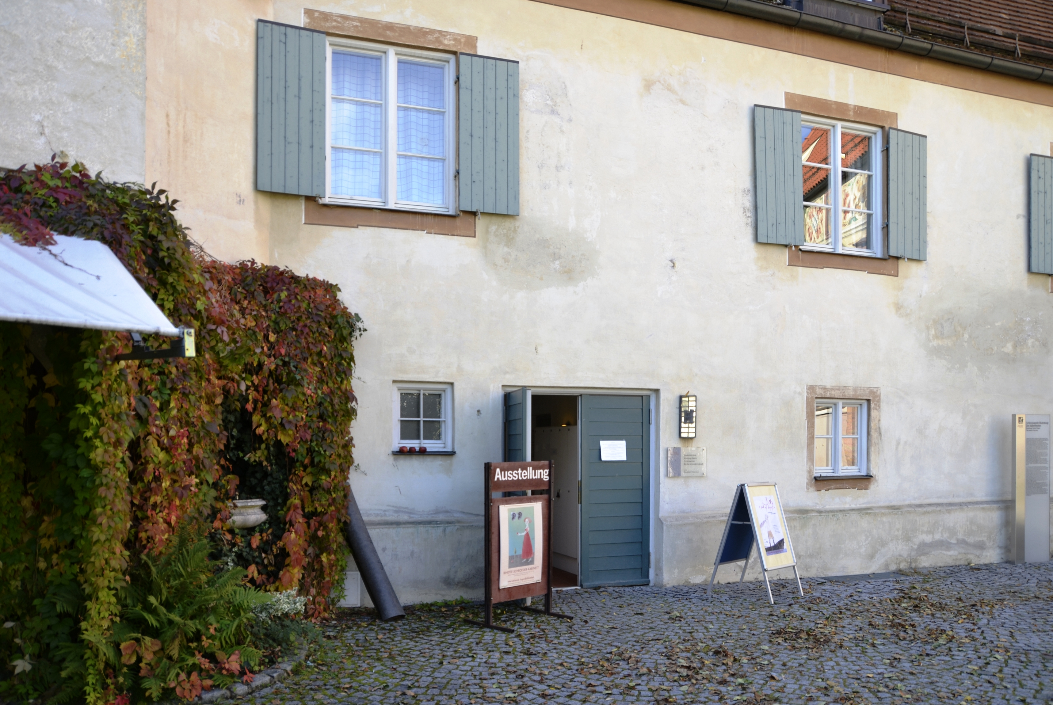 Das Schloss Blutenburg in München im Herbst 2012.